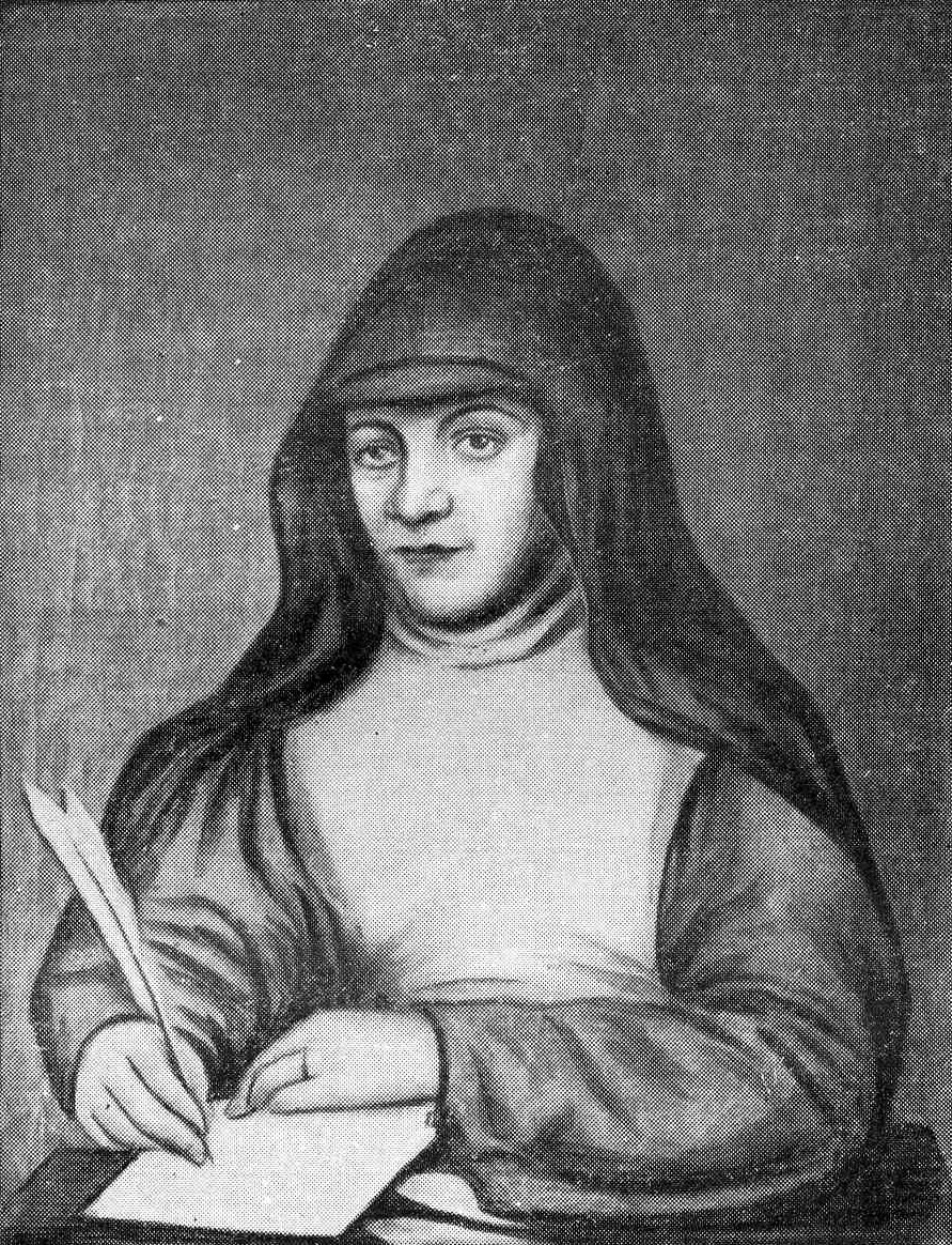 Portrait (1819) de Mère Rosalie Javouhey, la plus jeune soeur de Mère Anne-Marie Javouhey (Soeurs de la concrégation Saint-Joseph de Cluny)